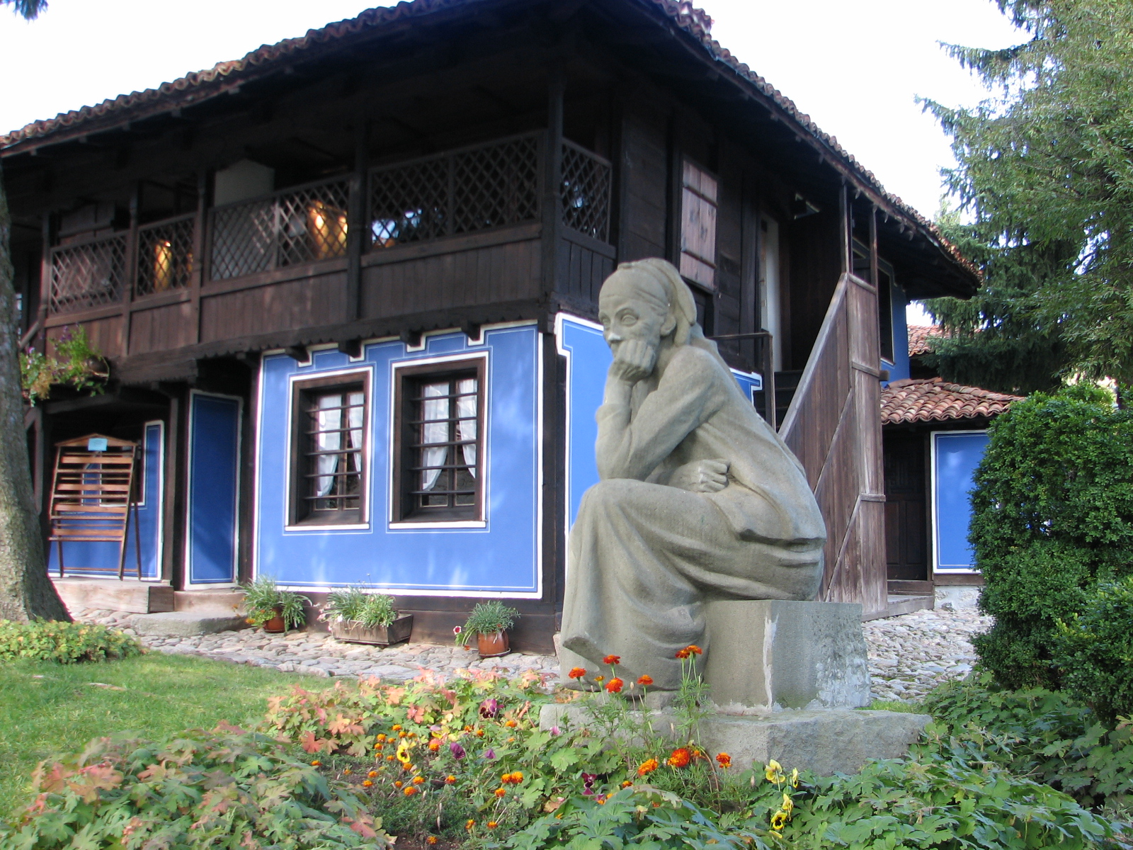 Къща - музей Димчо Дебелянов